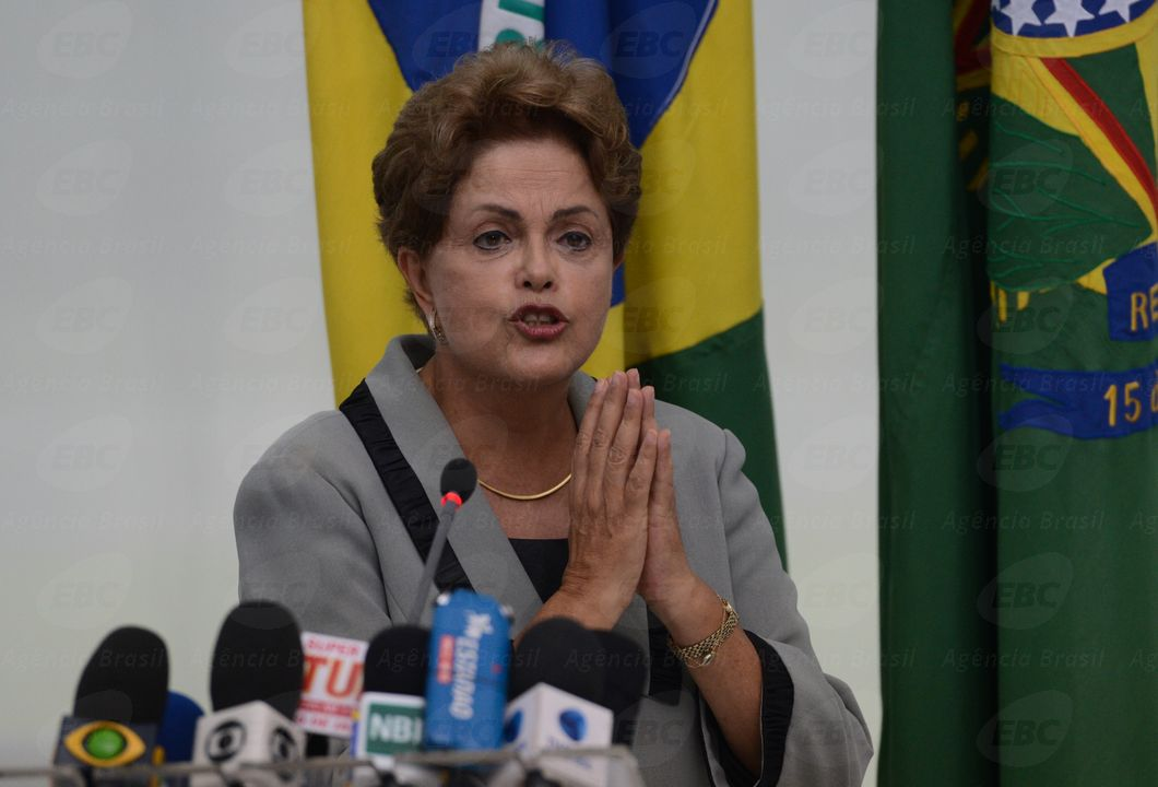 A presidente Dilma Rousseff comenta sobre os protestos ocorridos em 15 de março de 2015 contra o governo e a corrupção.